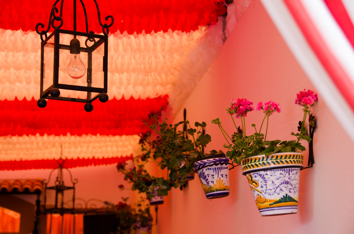 Feria de abril de Sevilla 2012